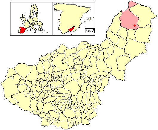 Situación de la localidad de Barrio Nuevo (en el municipio de Huéscar) respecto a la provincia de Granada, en España.